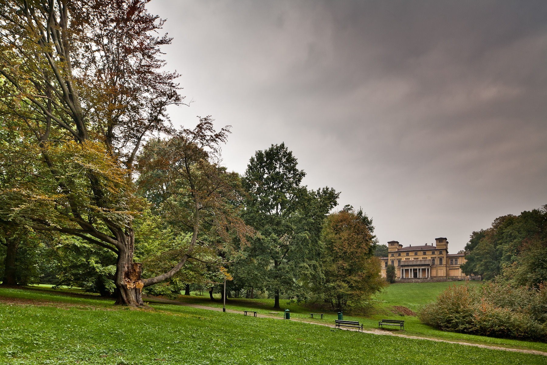 Zespół pałacowy Potockich - pałac (tzw. nowy), Krzeszowice - widok ogólny